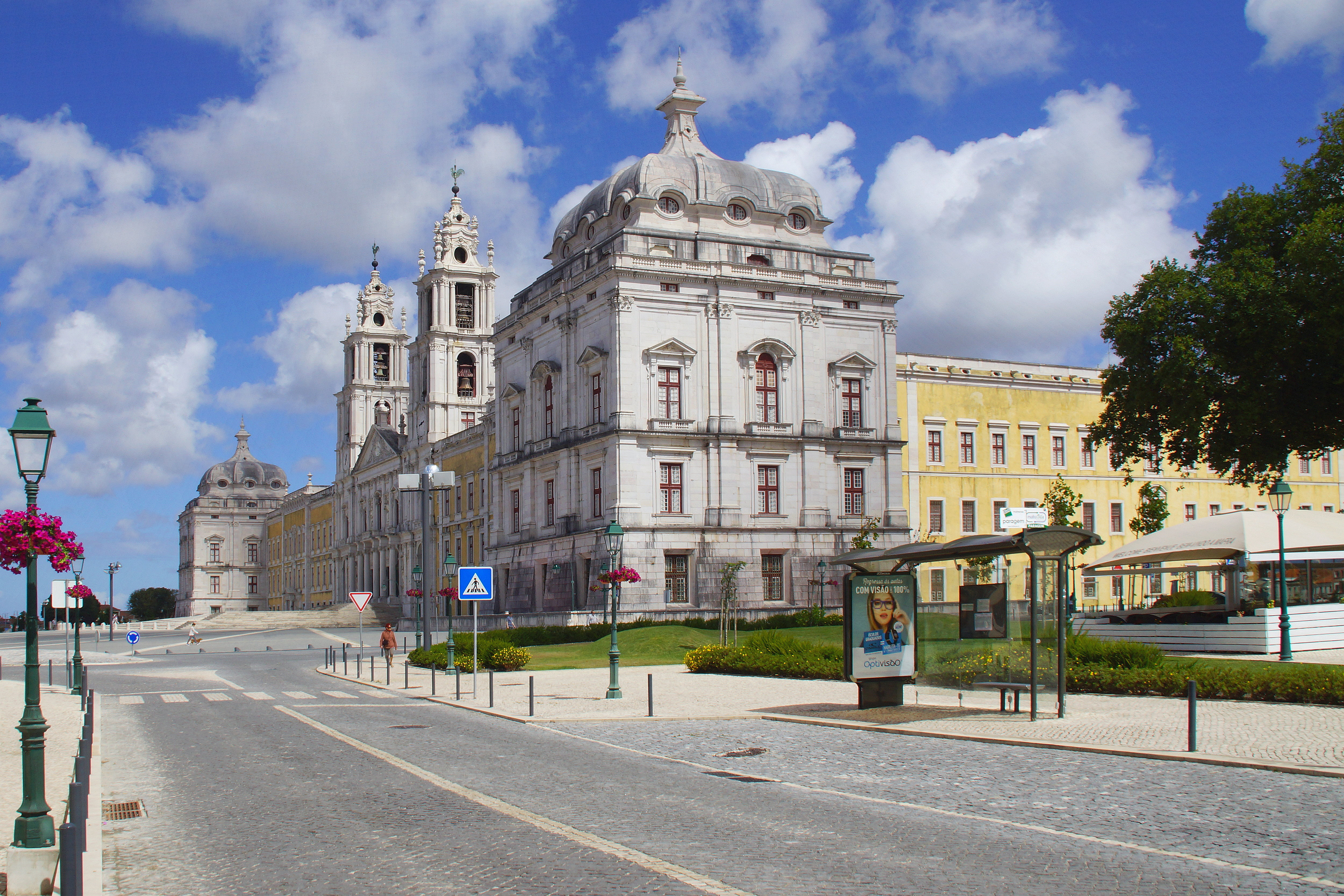 Ansicht SSW Palácio Nacional de Mafra mit Basilika Terreiro D. João V neugestaltet - Foto 2016 Wolfgang Pehleman DSC00803